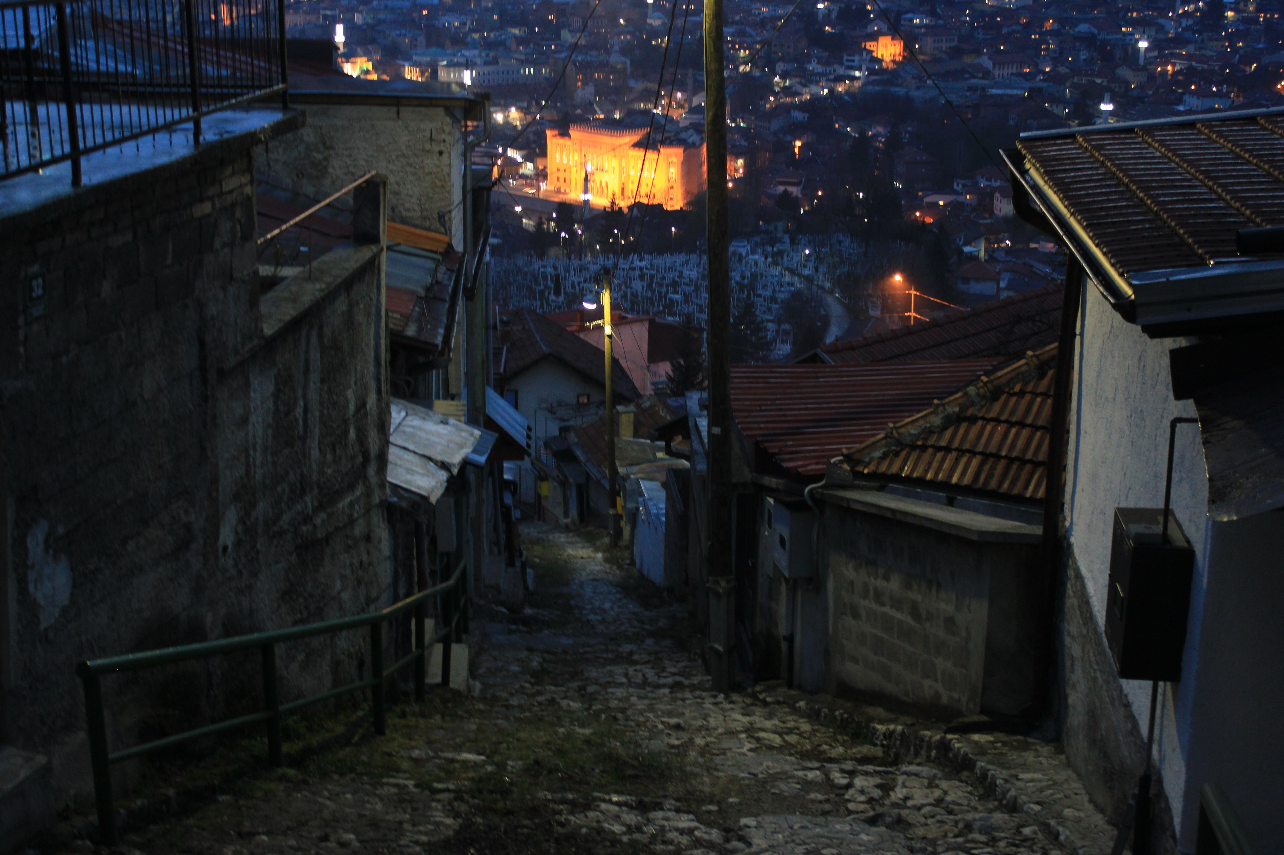 Hornjoserbsce: Napohlad Sarajewskeje radnicy w nocy.